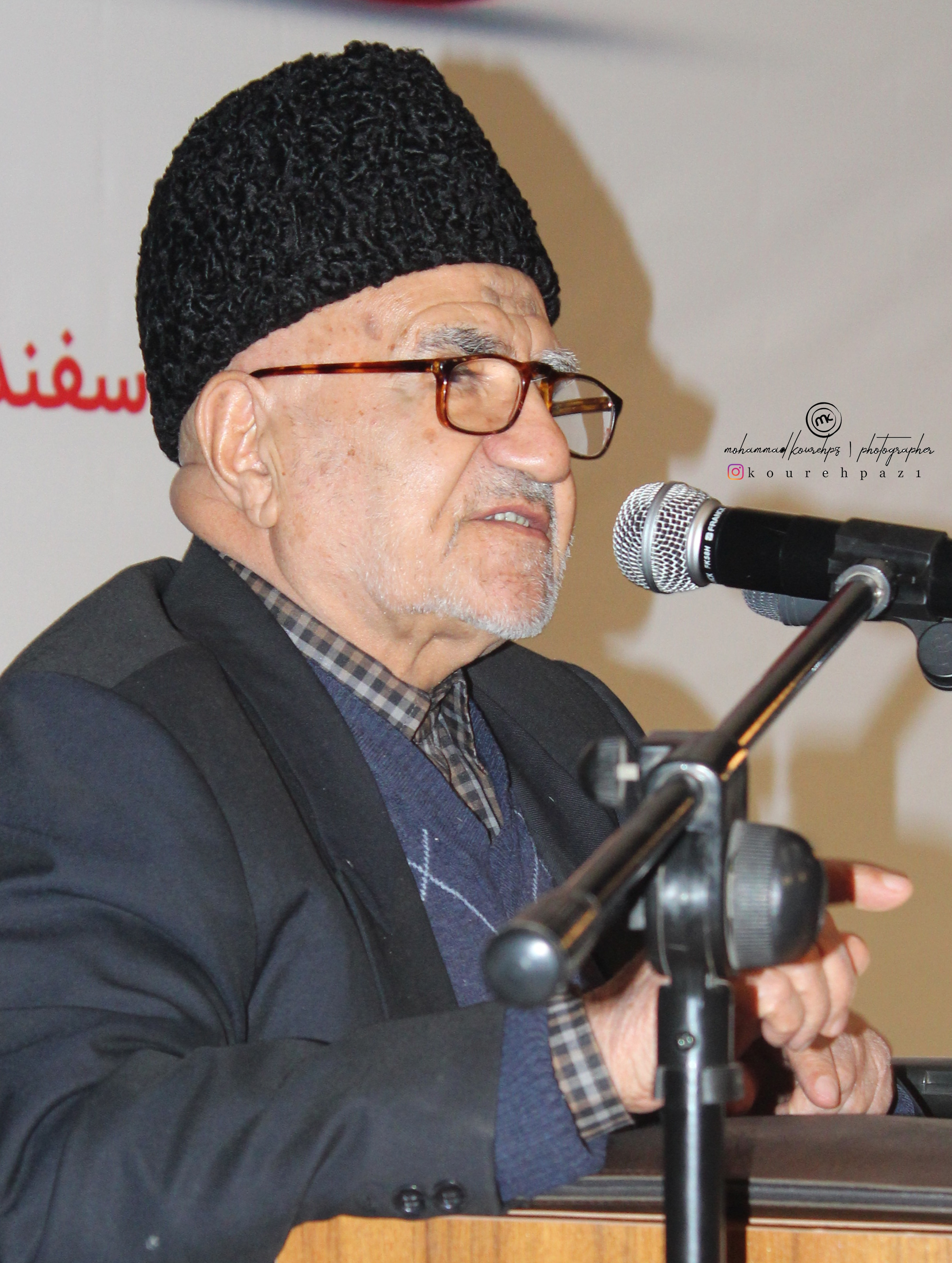 شعر خوانی استاد کریمی مراغه ای در جشن طنز زنجفیل